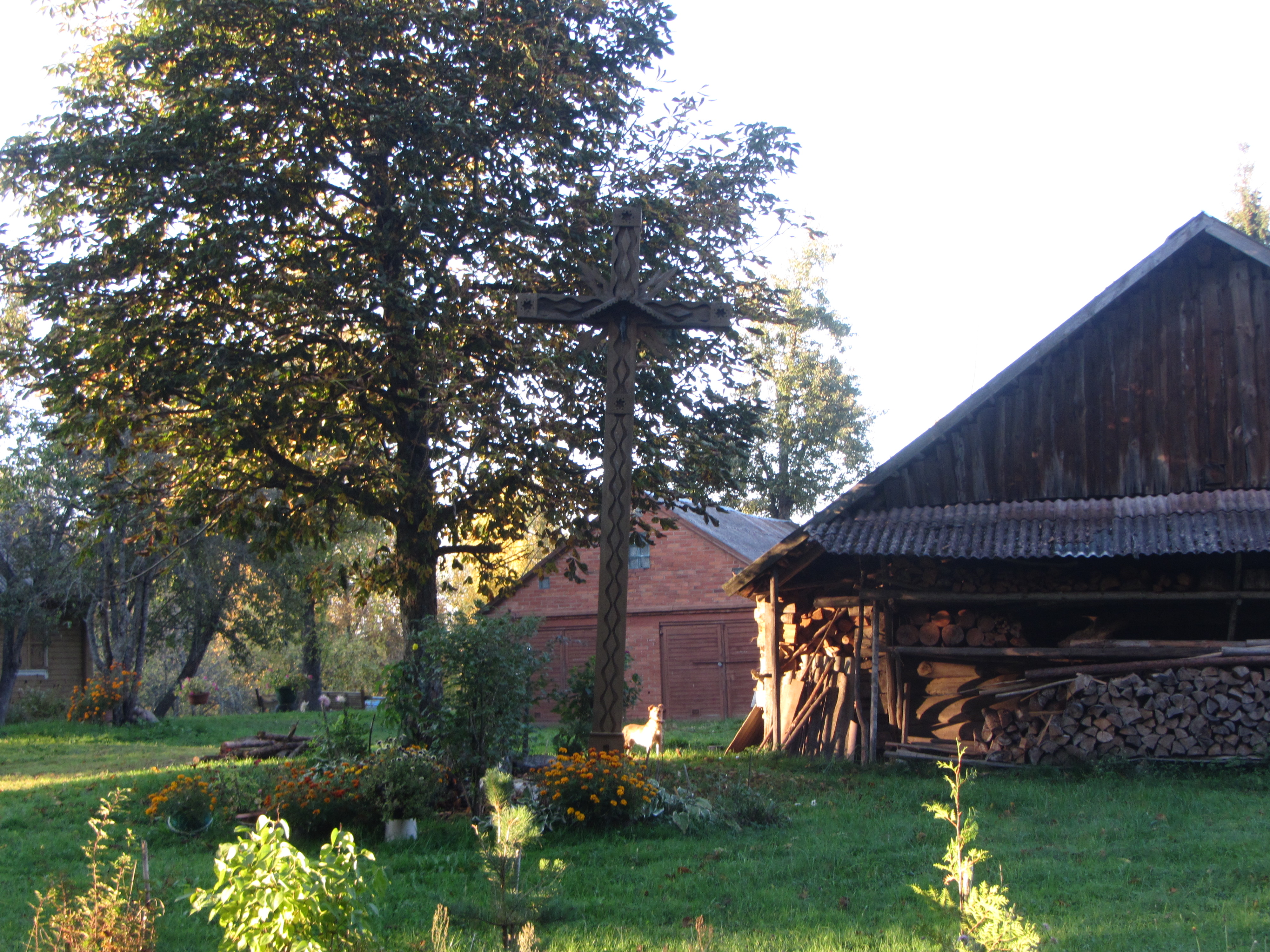 Linkmenų sen., Lithuania